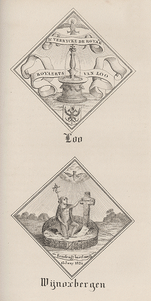 bron: J.F. Willems (red.), Belgisch museum voor de Nederduitsche tael- en letterkunde en de geschiedenis des vaderlands (Tweede deel). Maatschappij tot Bevordering der Nederduitsche Taal- en Letterkunde, Gent 1838